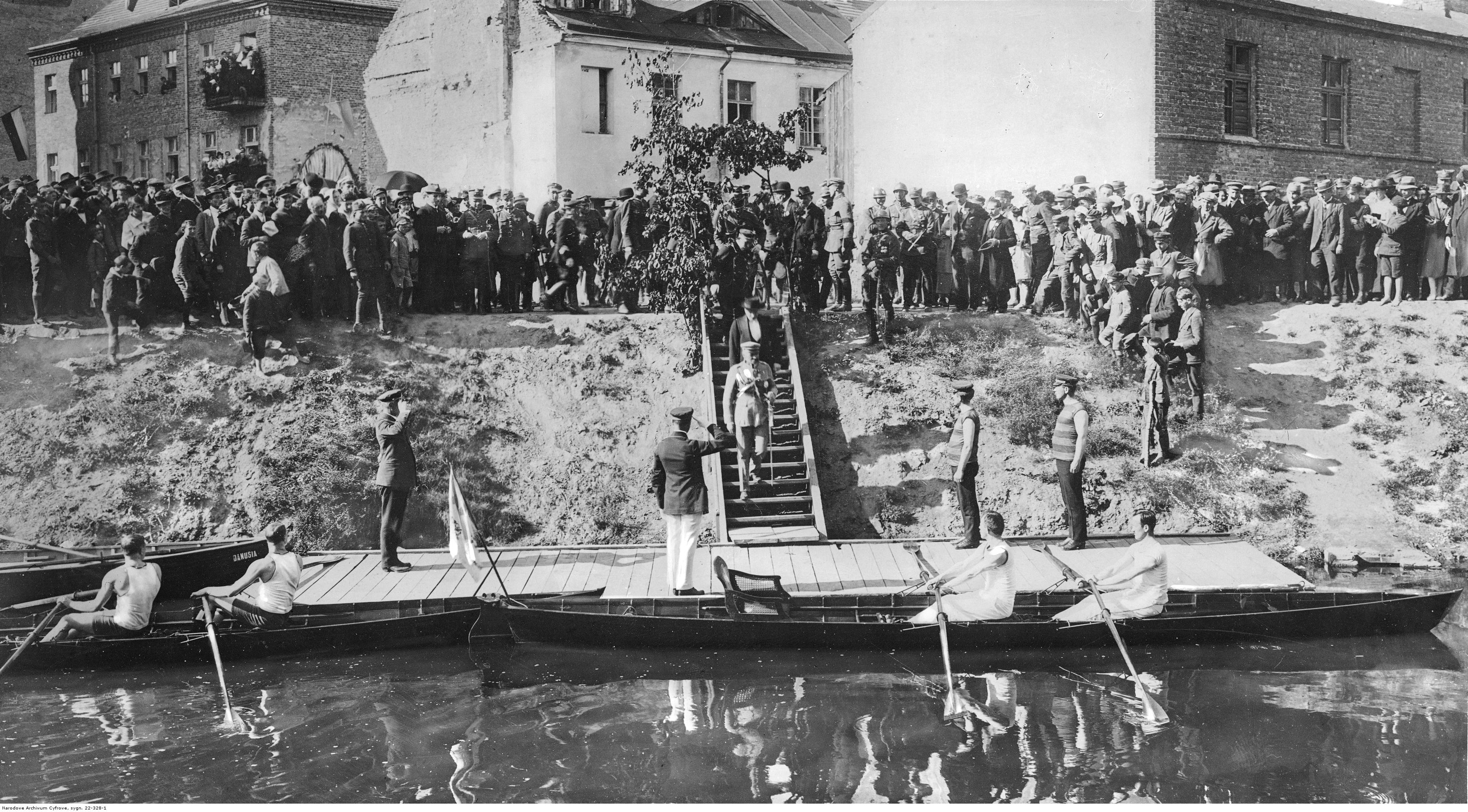 Marszałek Józef Piłsudski na przystani rzecznej.